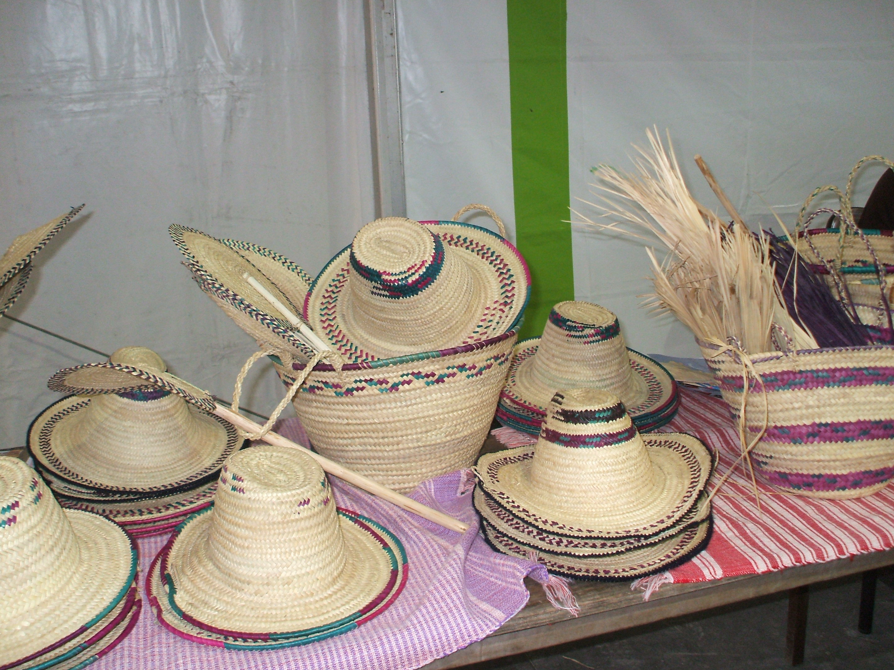 artisanat marocain